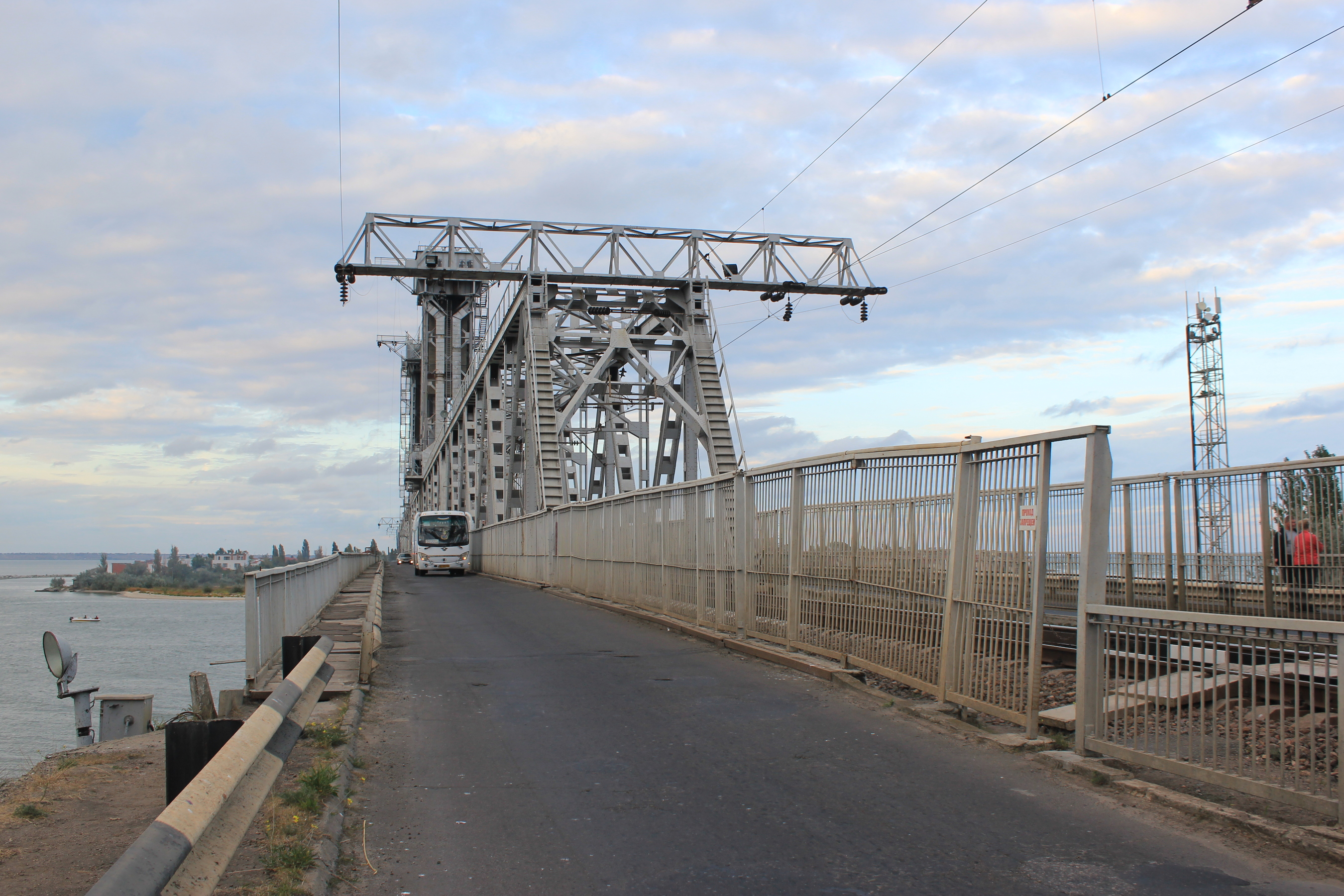 Kombinierte Bahn-Straßen-Brücke über die Mündung des Dnister-Limans in das Schwarze Meer bei Satoka.